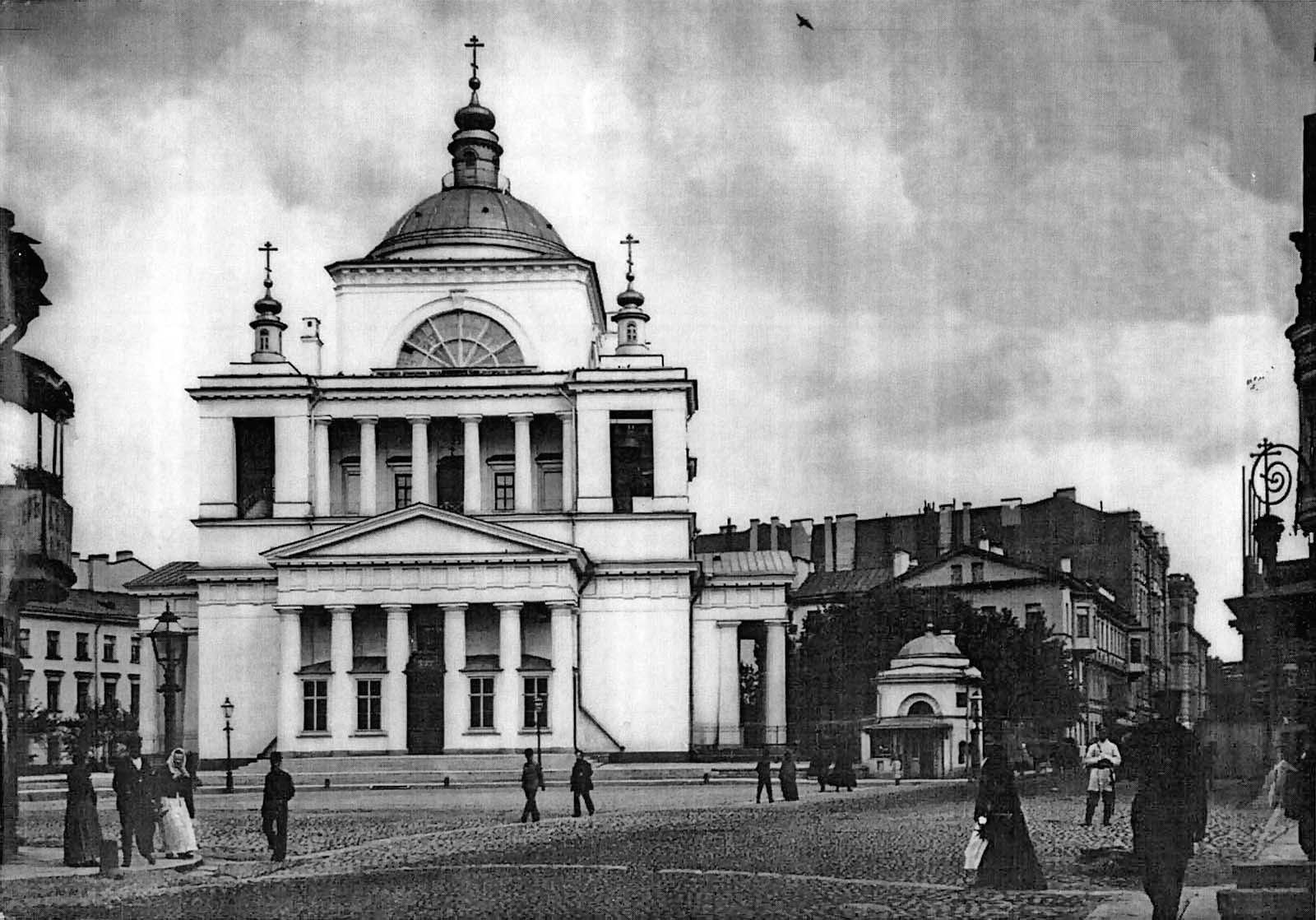 Никольский единоверческий собор в Санкт-Петербурге